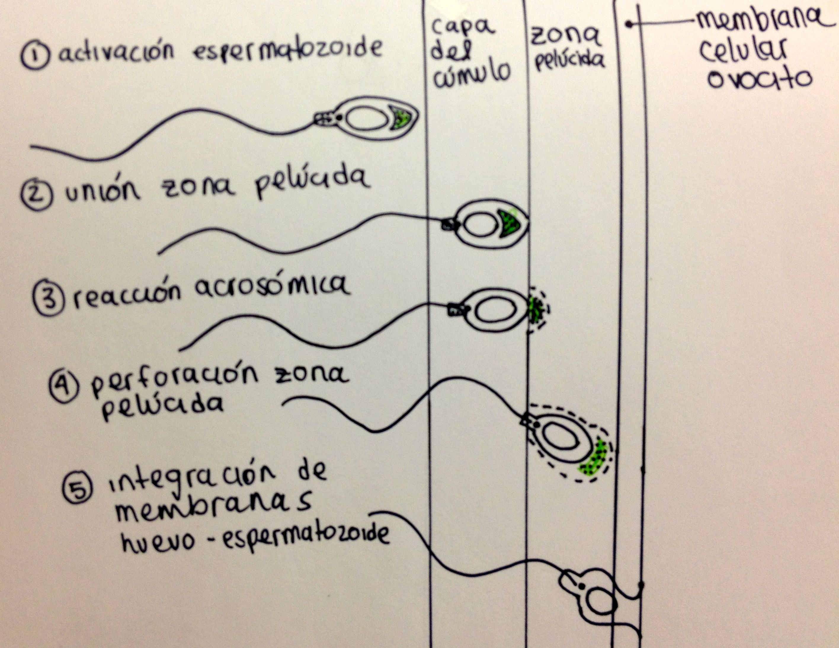 Cinco pasos de la fusión de membrana plasmática del espermatozoide y del gameto femenino (mamíferos) 1) activación espermatozoide 2)unión con la zona pelúcida (ZP3) 3)reacción acrosómica (liberación de contenidos de la vesícula acrosómica ubicada en la cabeza del espermatozoide) 4)perforación zona pelúcida 5)Integración de membranas huevo-espermatozoide